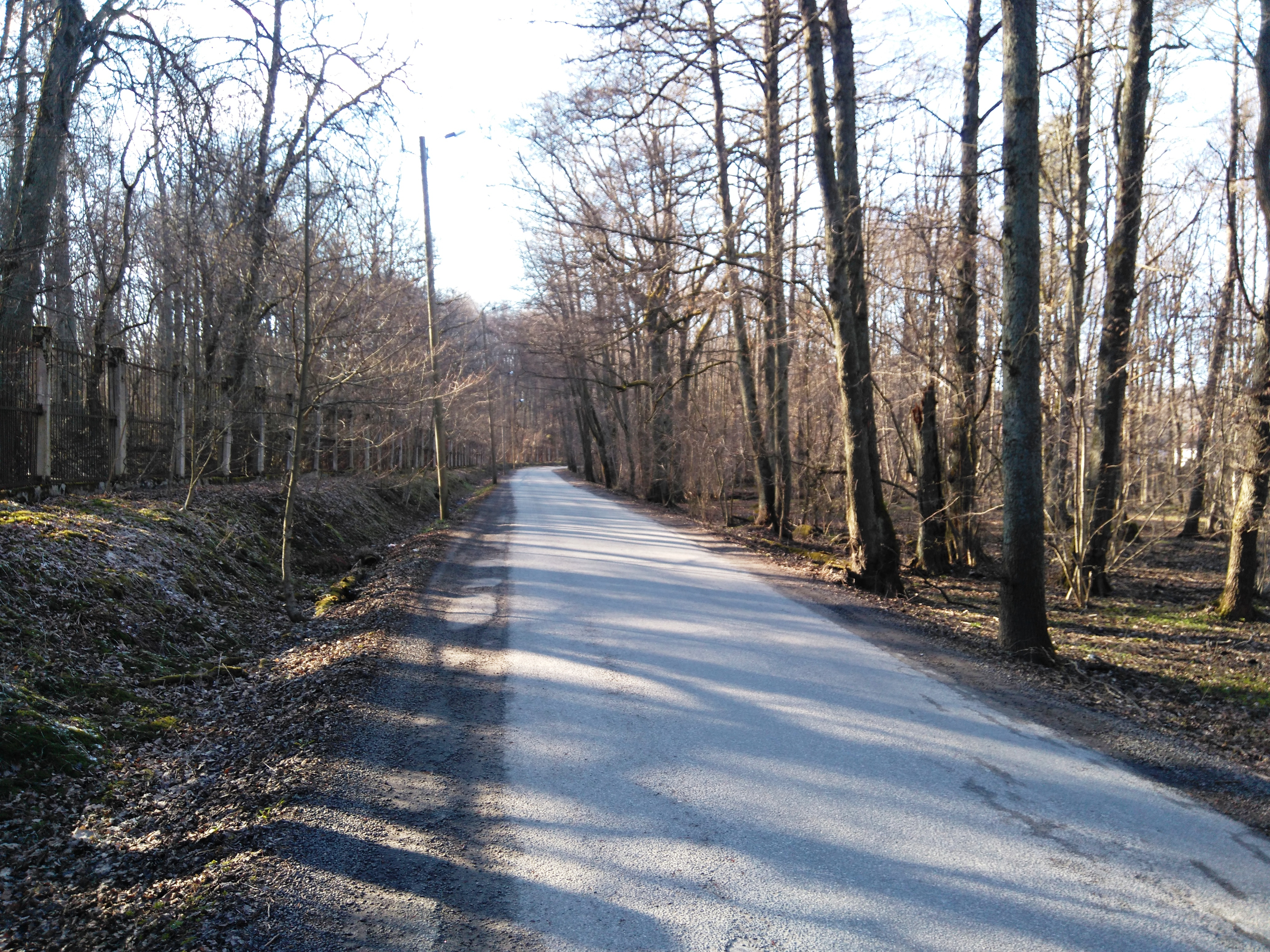 Tuuliku tee Tallinnas.